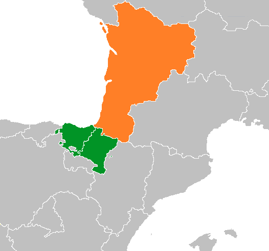 Eurorregión Akitania Euskadi Navarra